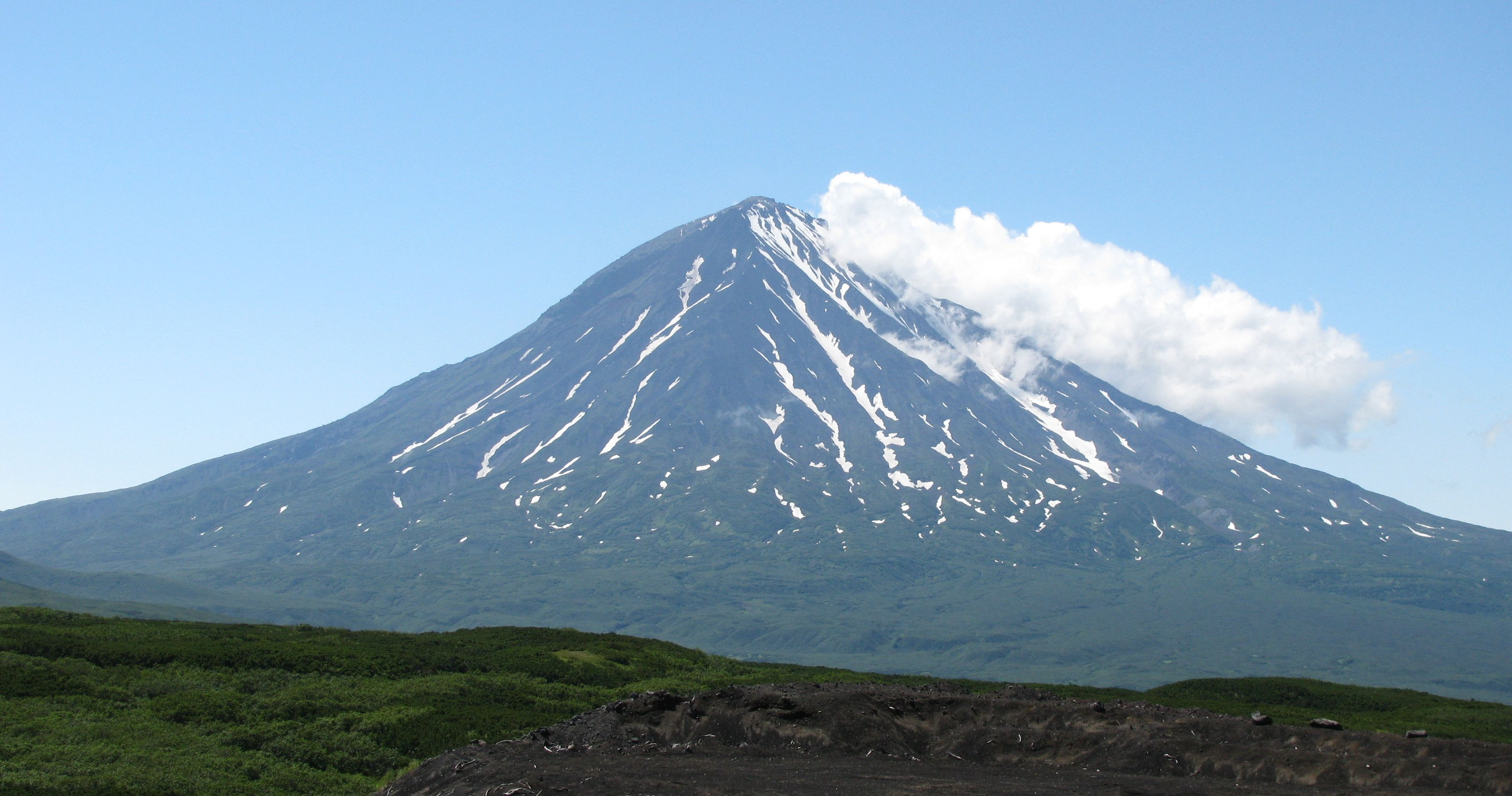 вид на вулкан Опала с северо-восточной стороны.